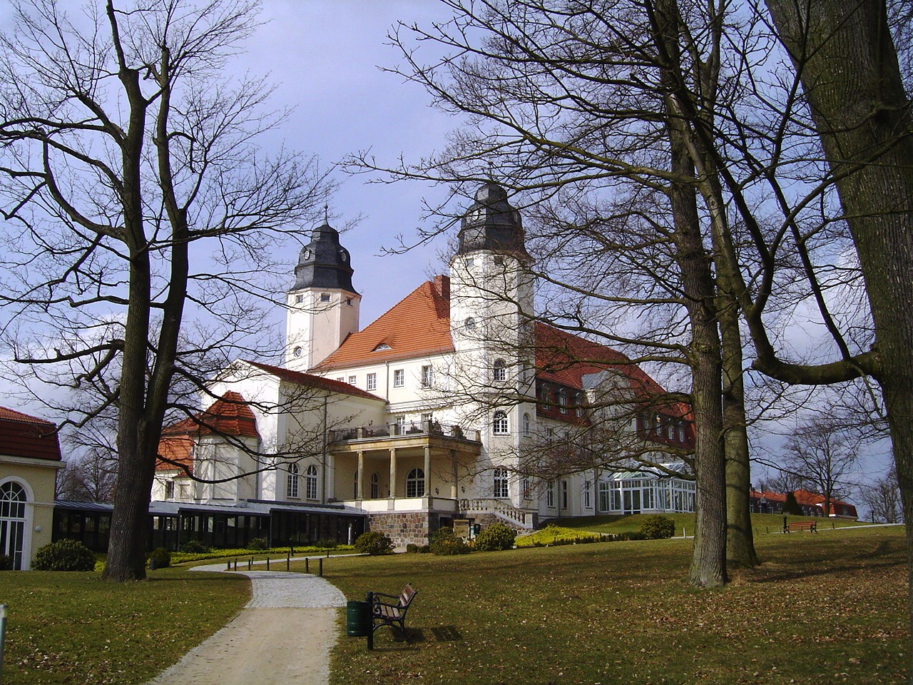 Mecklenburg-Vorpommern, Deutschland, Schloss Blücher in Göhren-Lebbin, Rückseitenansicht. Eigenes Foto vom 02.04.2006 von User:Ile-de-re